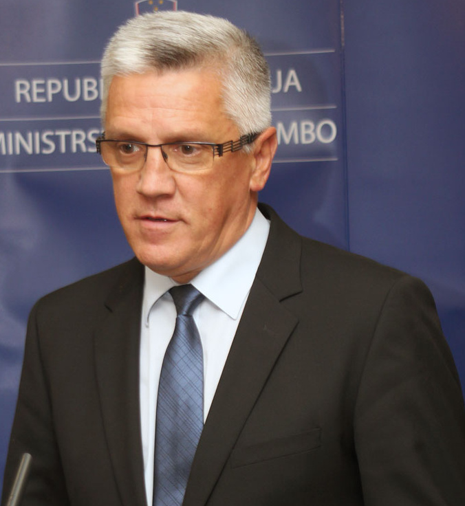 Peter Vilfan